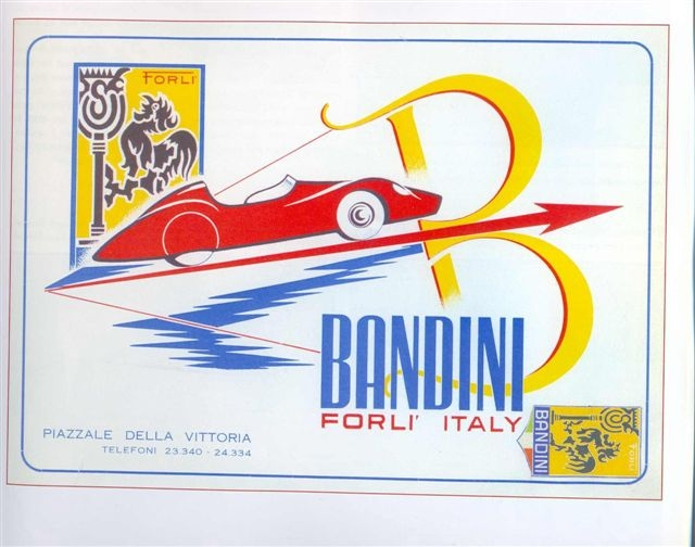 Bandini cars brochure tratta da Libro: Bandini (storia della vita e automobili di Ilario Bandini)